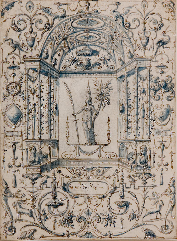 Wzór ornamentu - groteska piórko, bistr na podkładzie ołówkowym, podmalowania niebieską akwarelą